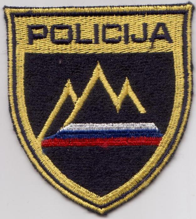 Slovenia